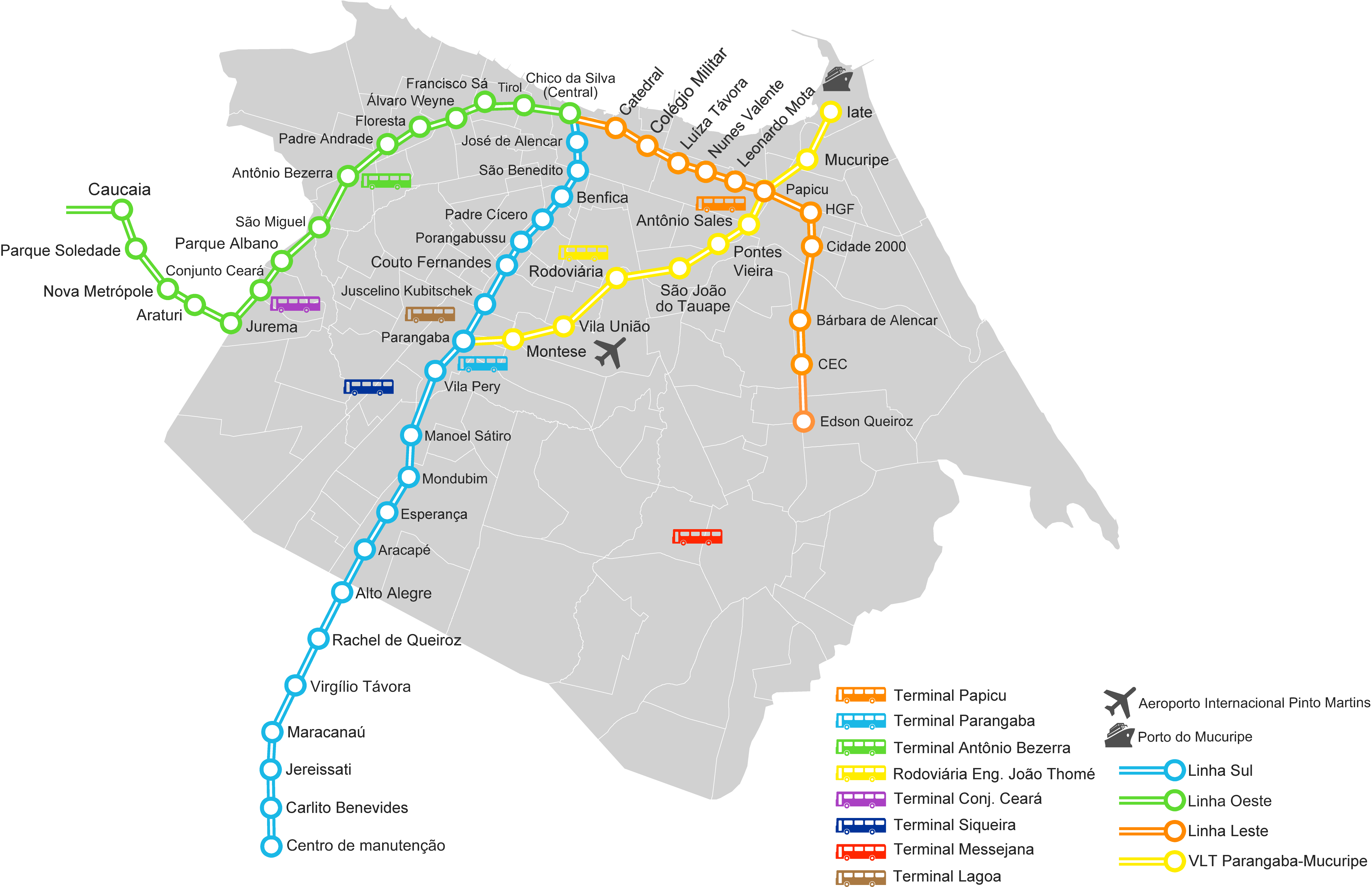 Porto, aeroporto, linhas de metrô e terminais rodoviários em Fortaleza, Brasil.